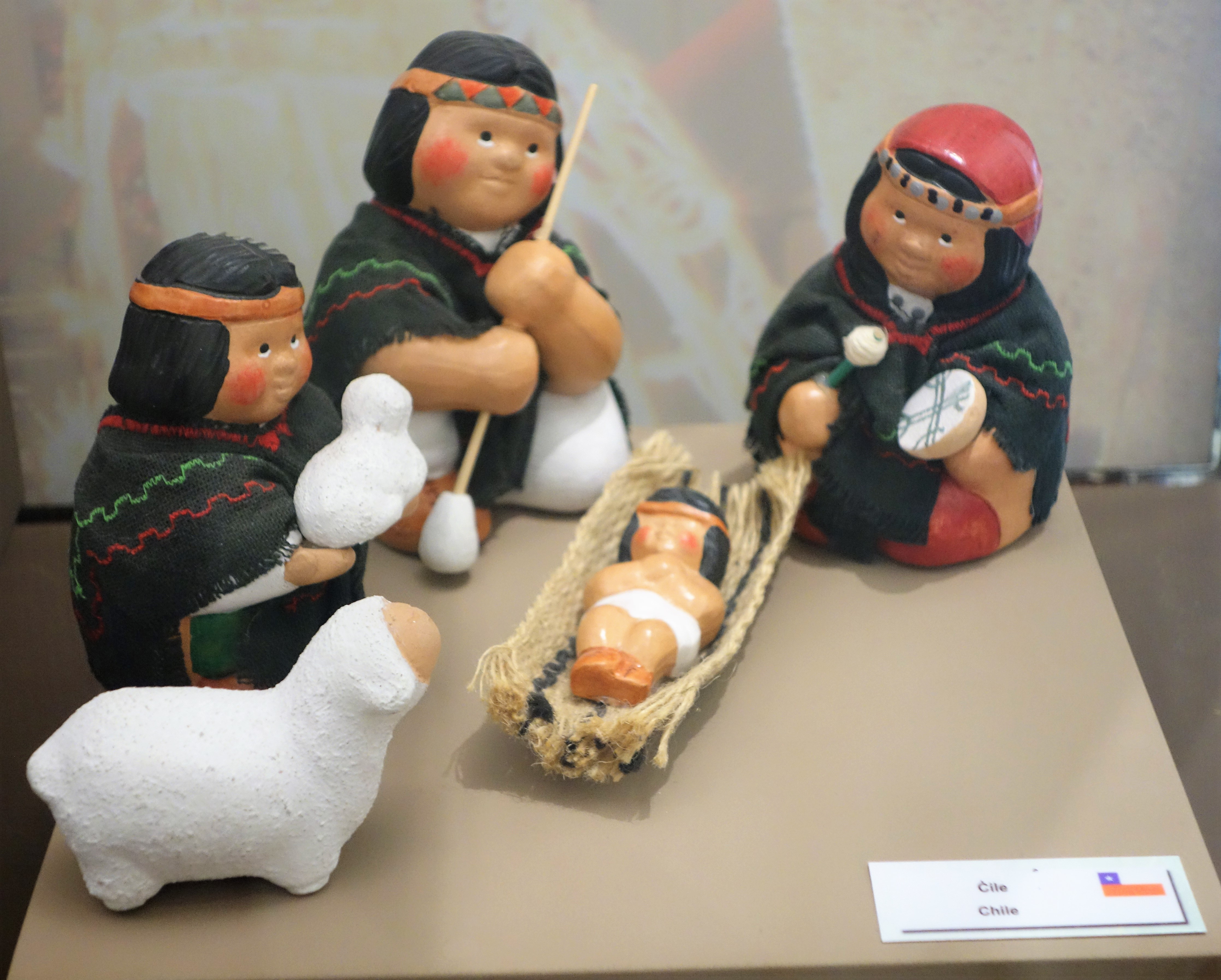 Crèche chilienne dans une exposition